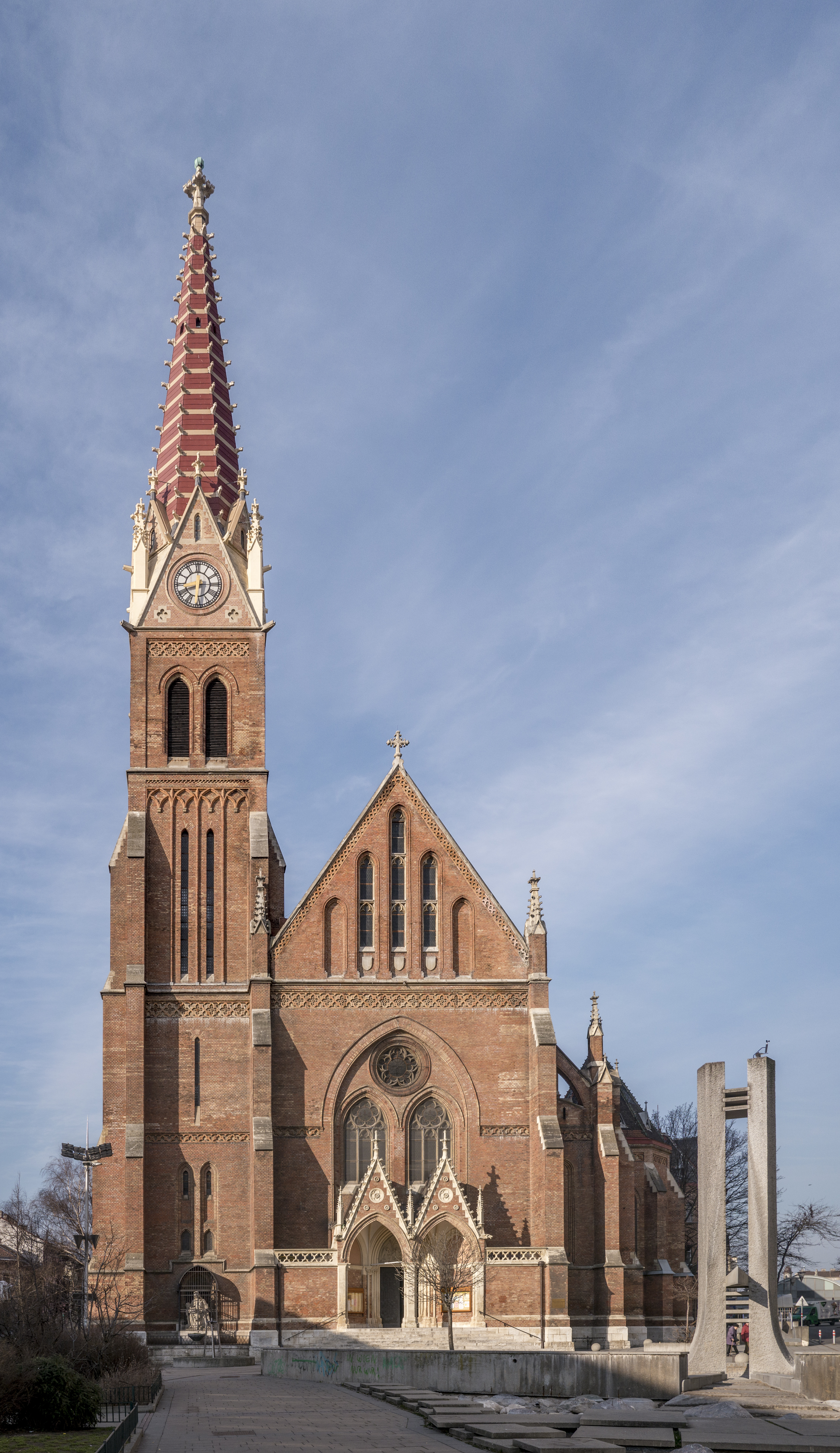 Kath. Pfarrkirche Maria - Königin der Märtyrer